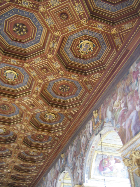 Salle de Bal